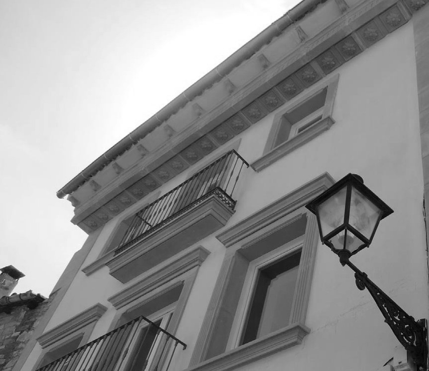 Casa de les joies situada al carrer de les joies Nº 33 al costat de l'Ajuntament.